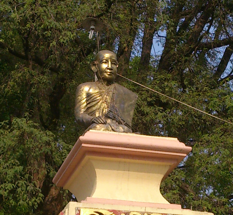 မြန်မာဘာသာ: မင်းကွန်းလူအိုရုံမှ ဒေါ်ဦးဇွန်း ရုပ်တု